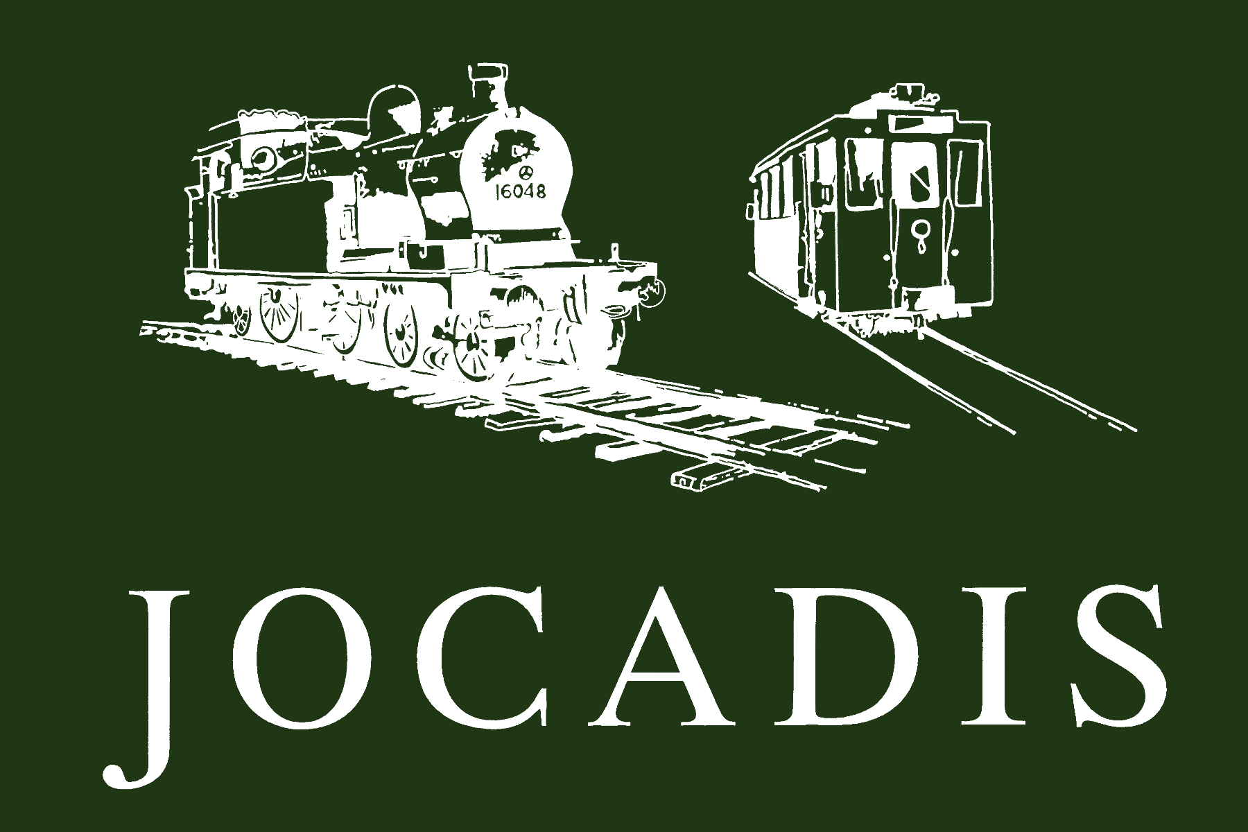 Image reconstituée à partir de matériel publicitaire